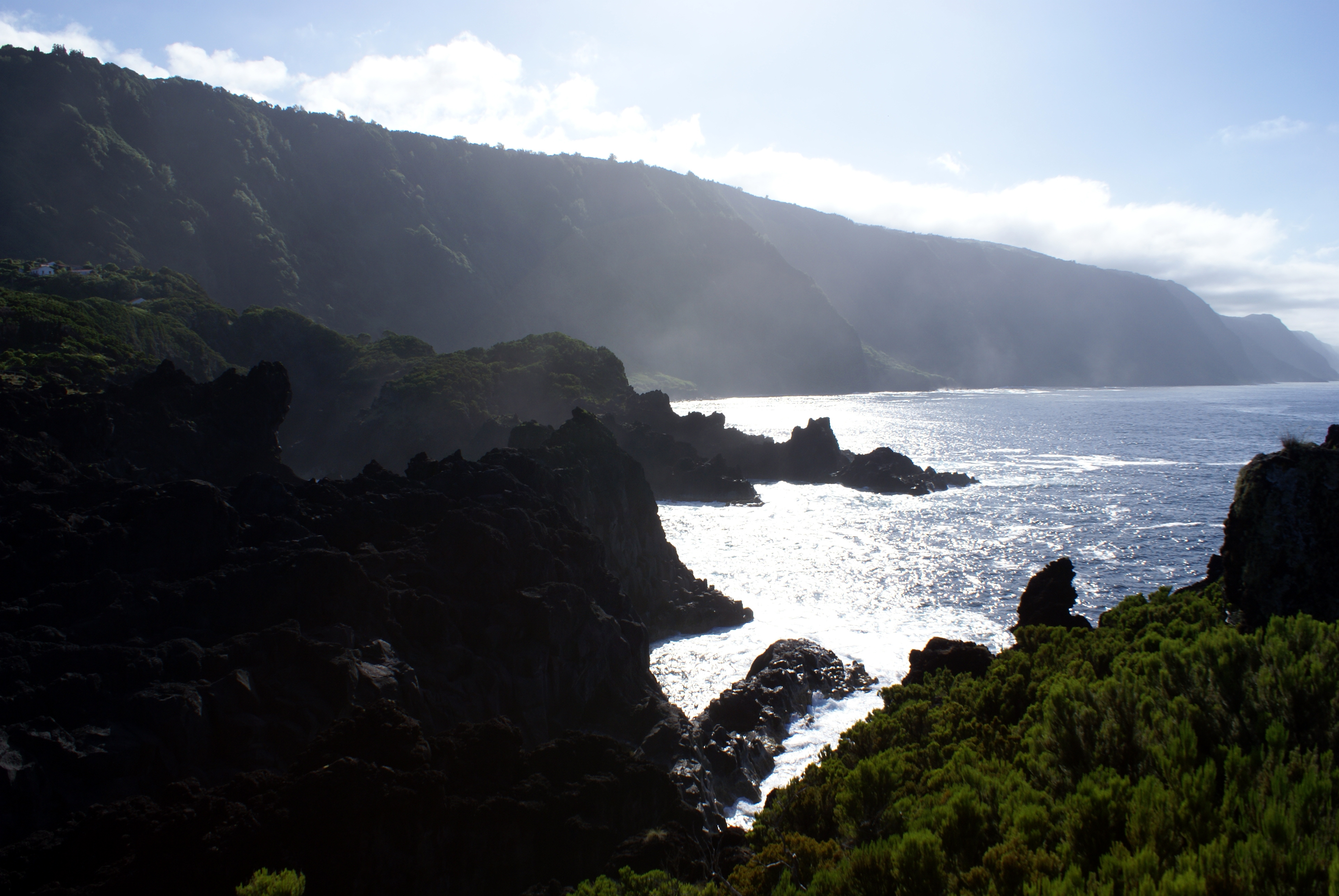 Fajã do Ouvidor, vista da costa, Norte Grande, Velas, ilha de São Jorge